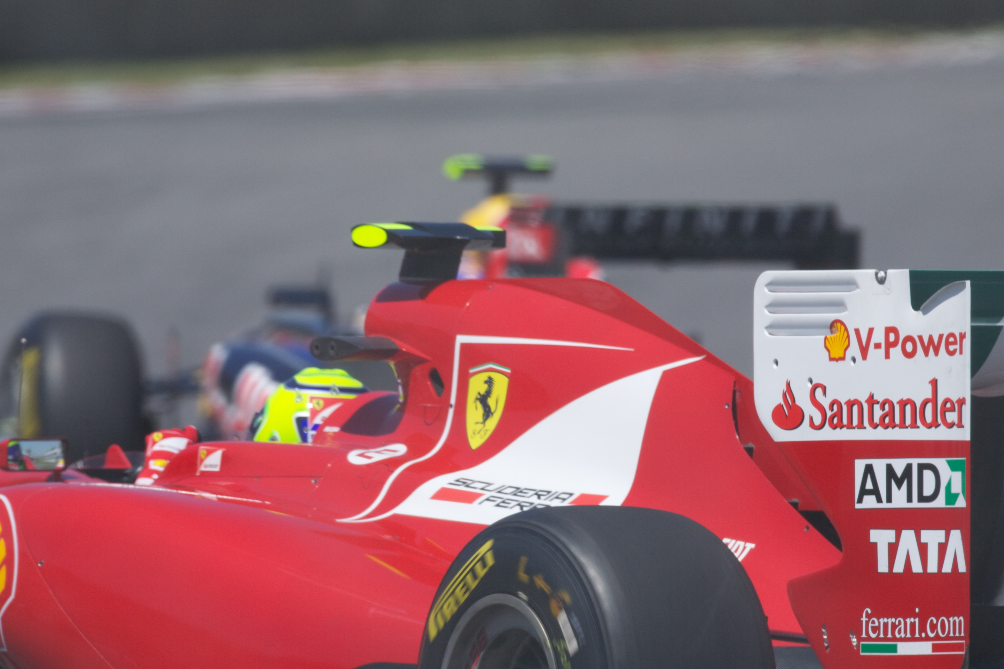 Ferrari F 150 au GP du Canada 2011